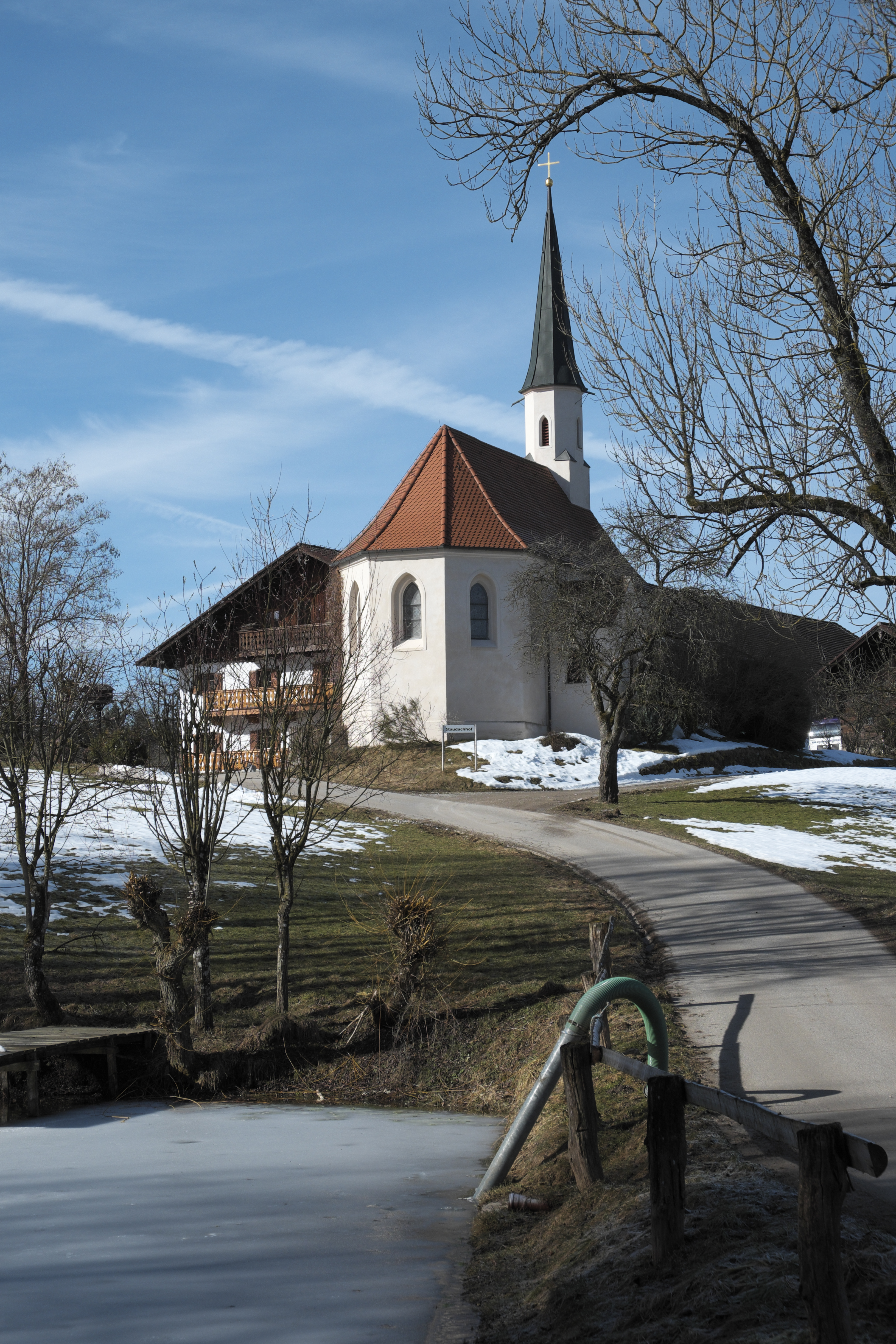 Katholische Filialkirche St. Vitus in Staudach (Stauder Hof), einem Ortsteil von Münsing im Landkreis Bad Tölz-Wolfratshausen (Bayern/Deutschland)